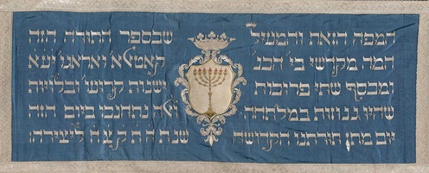 מפה בית כנסת קטלאן רומא